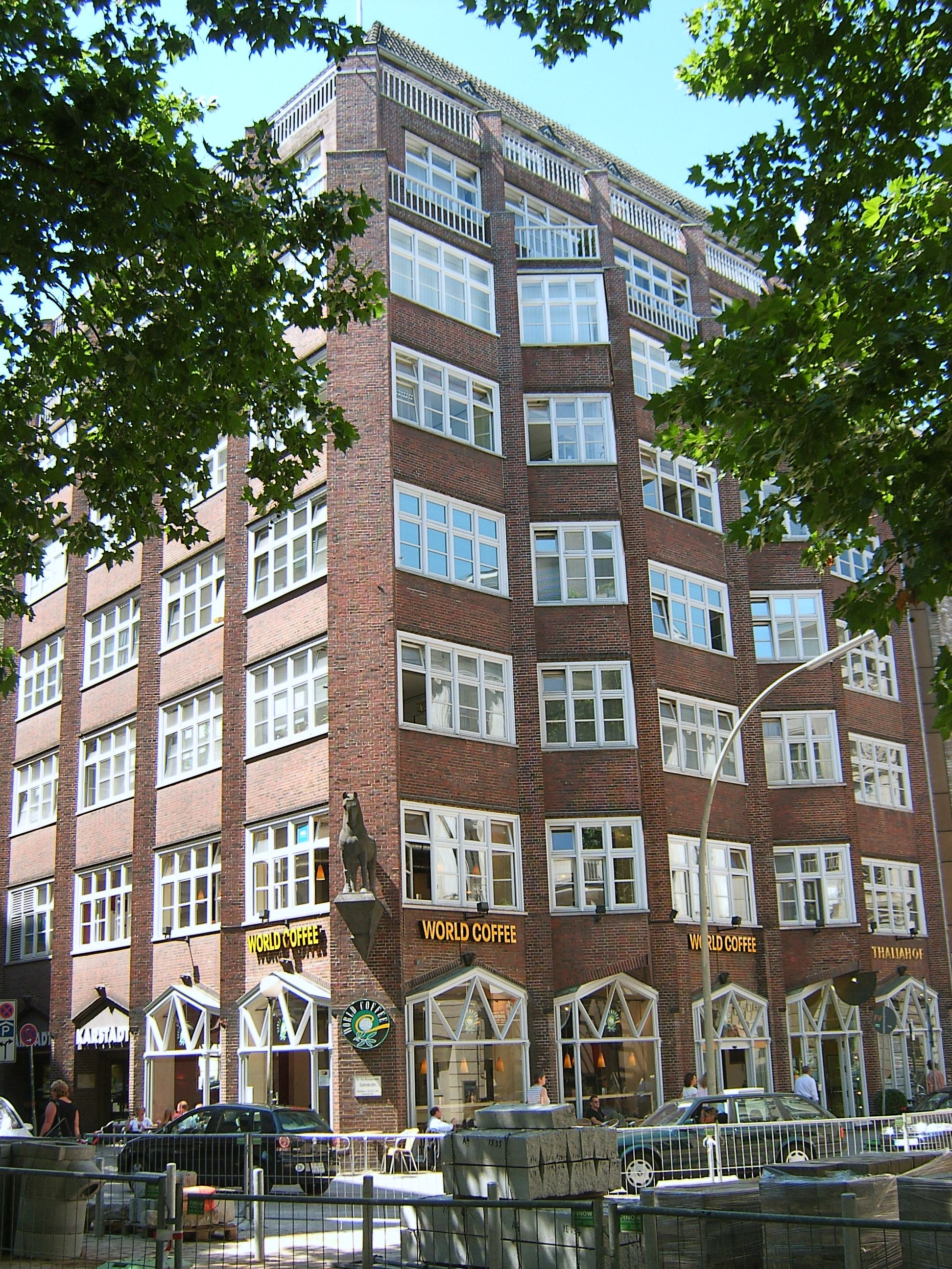 Hamburg, Innenstadt, Thaliahof